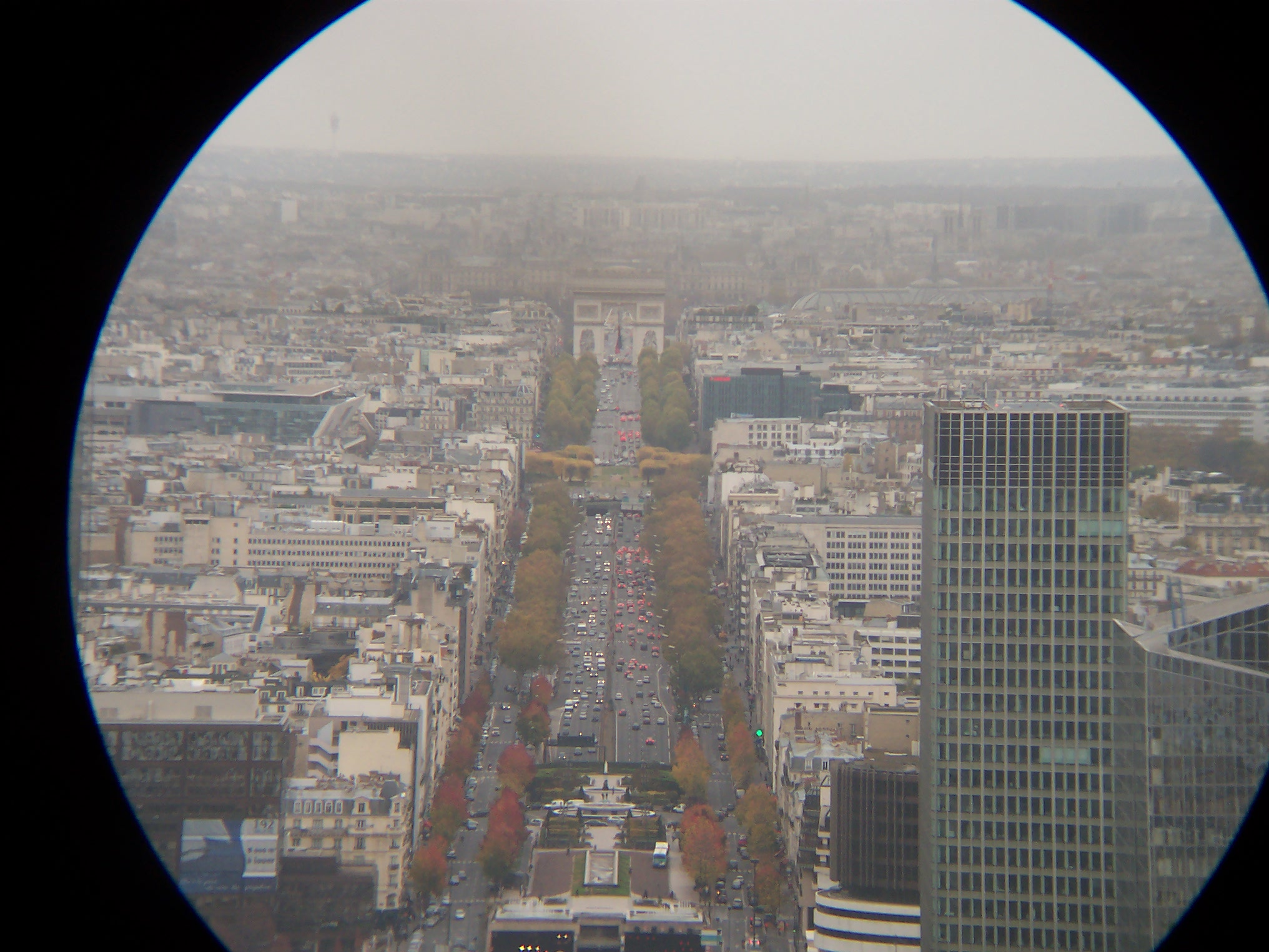 L'axe historique